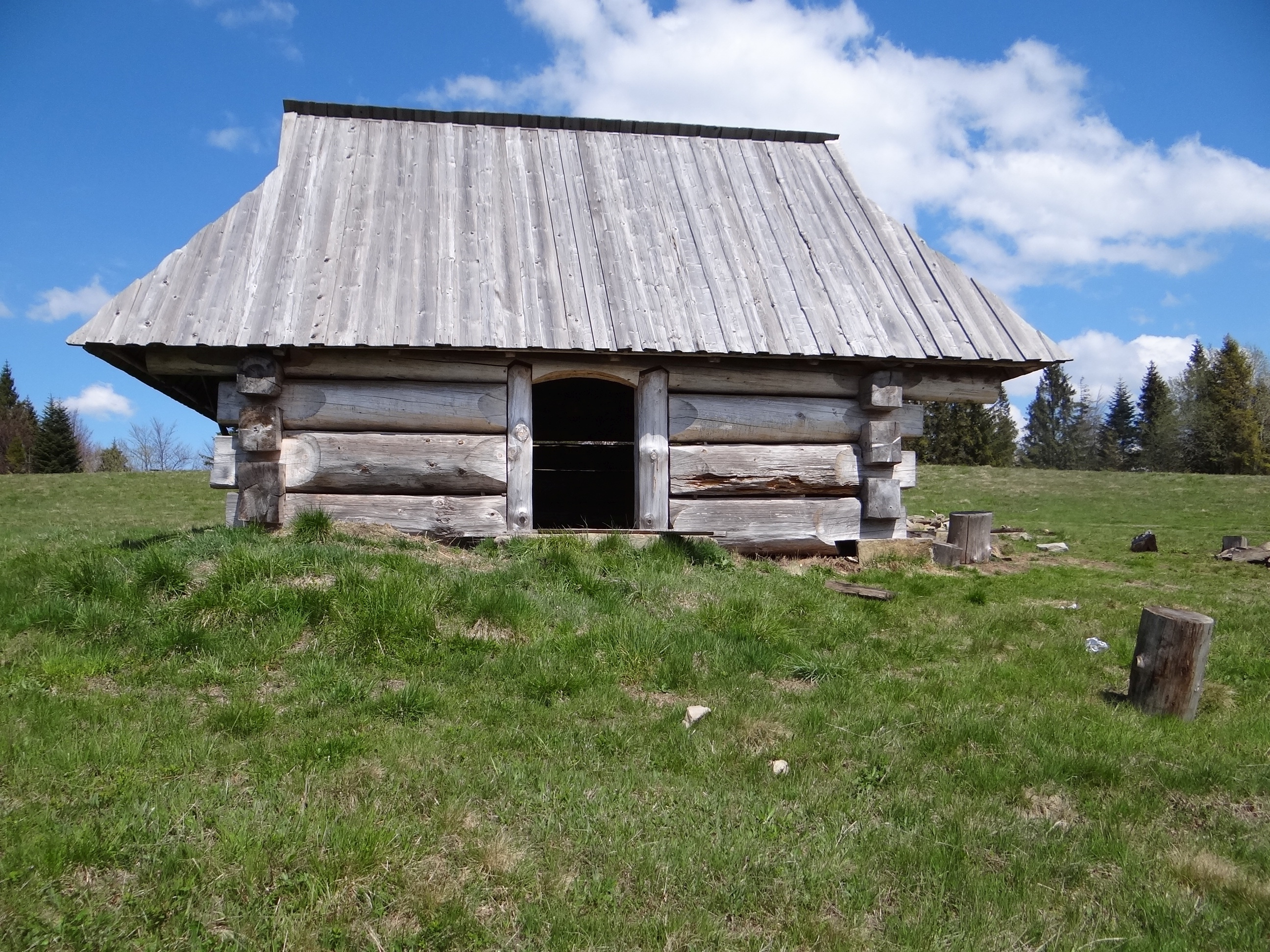 Nowy szałas na Magurkach